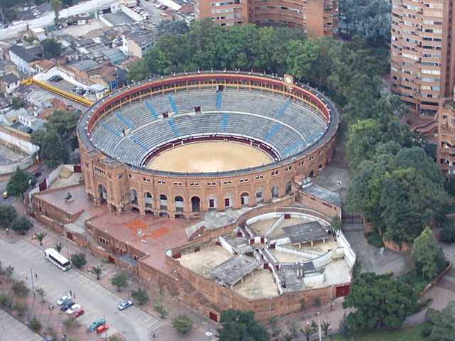 Santamaria bullring in Bogota